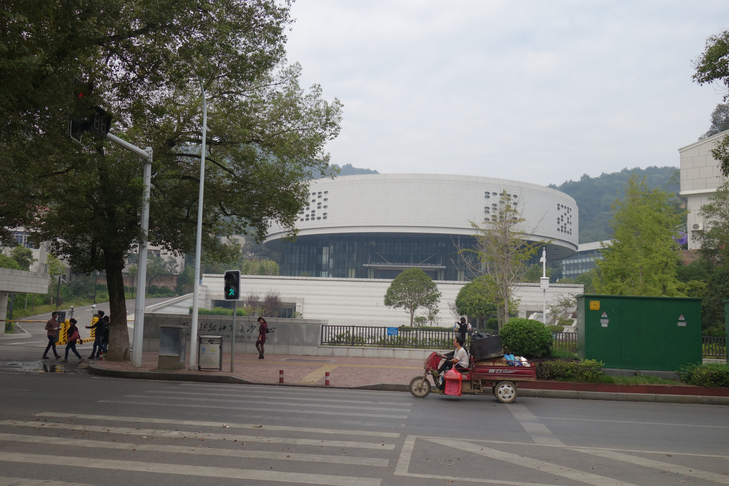 中文（中国大陆）: 国家超级计算长沙中心